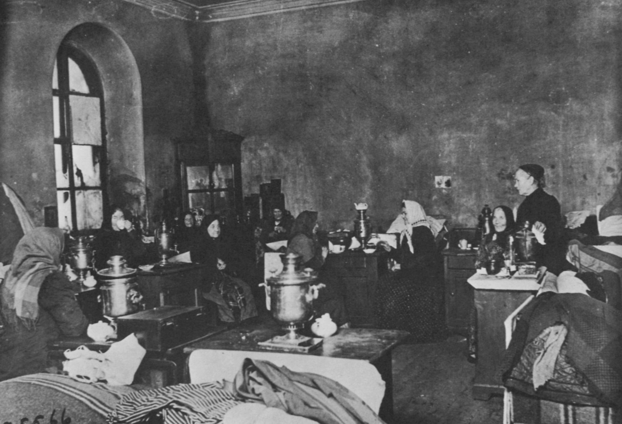 Russischer Photograph: Ein Altenheim